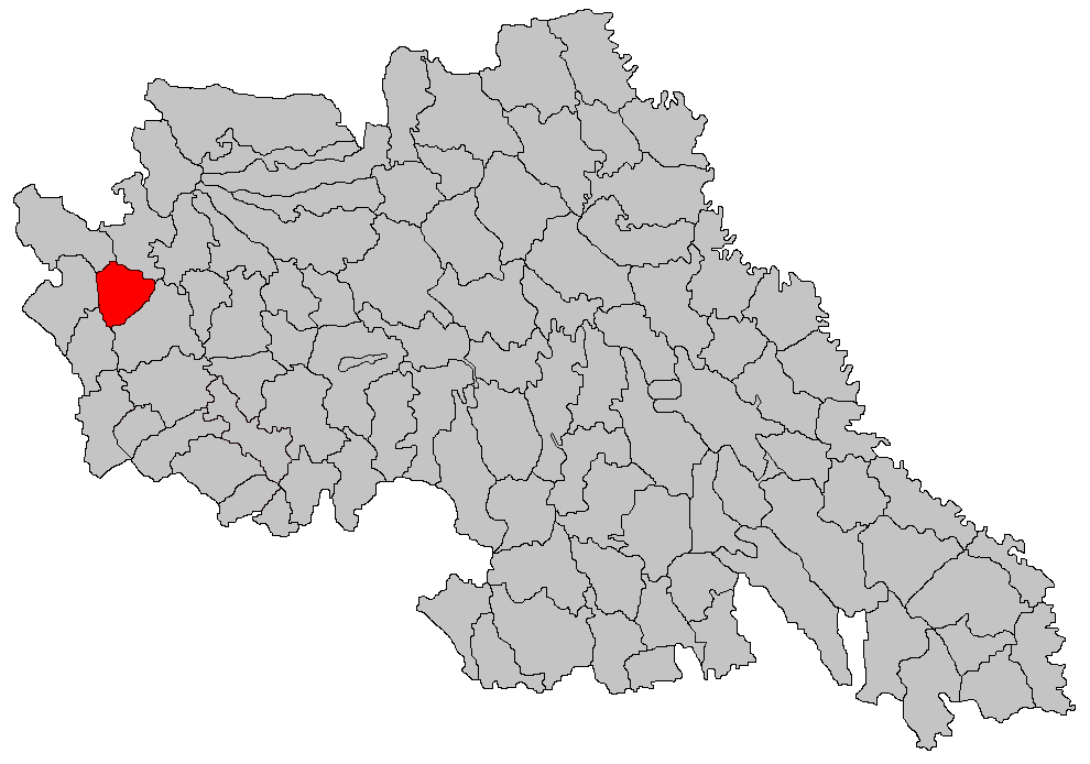 Categorie:Hărţi ale judeţului Iaşi